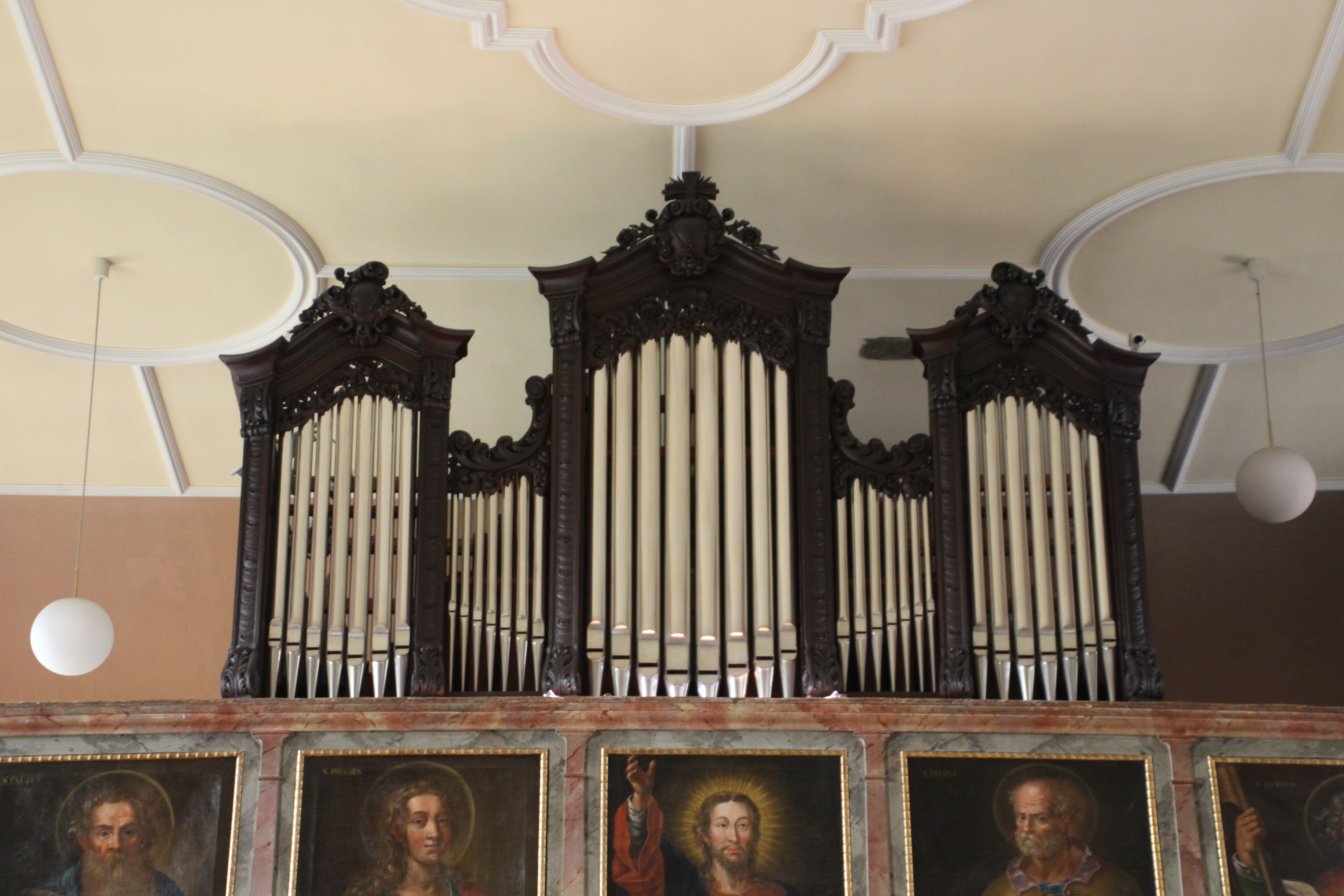 Kirch Heldenberg